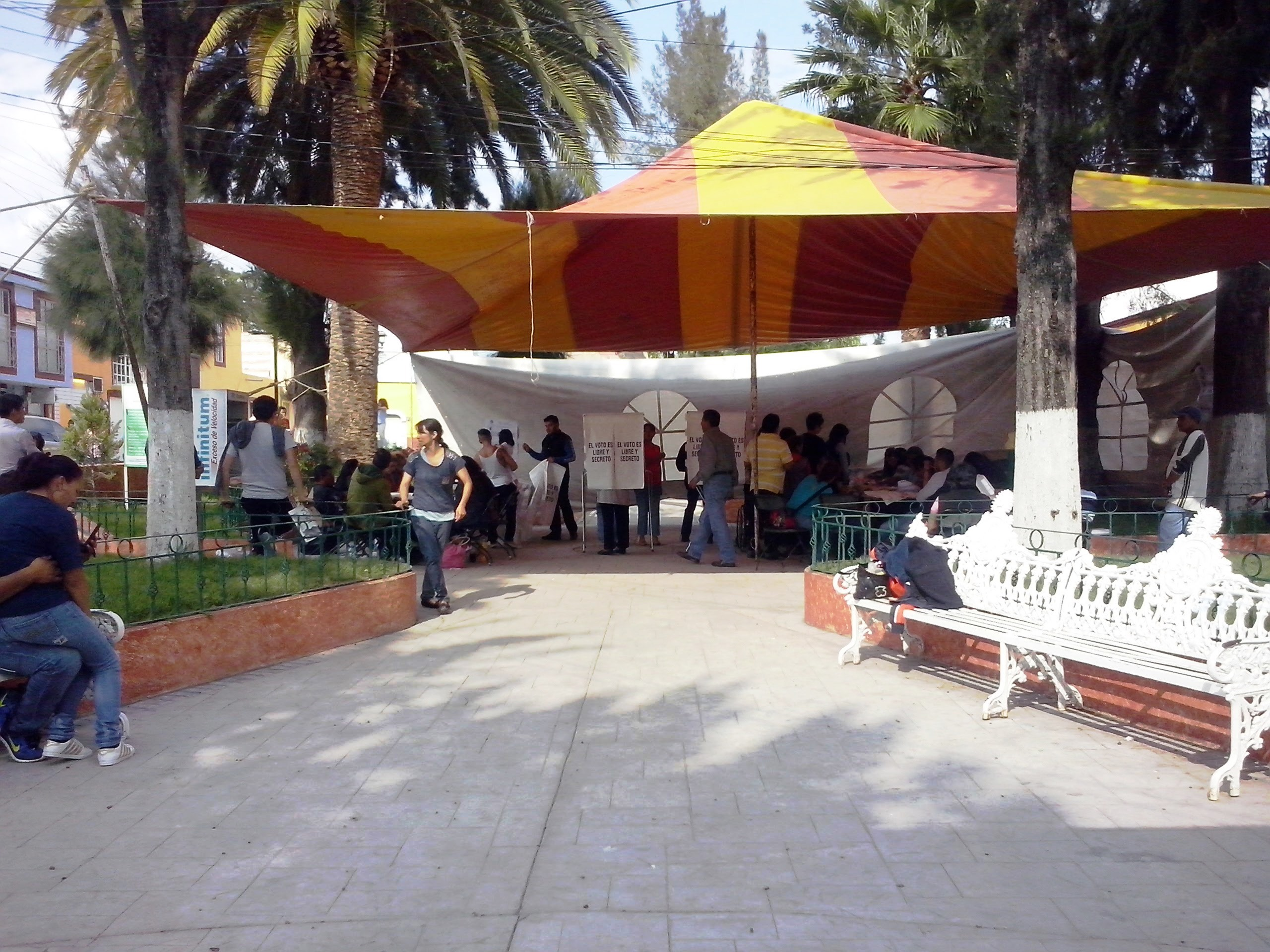 Casilla hidalgo